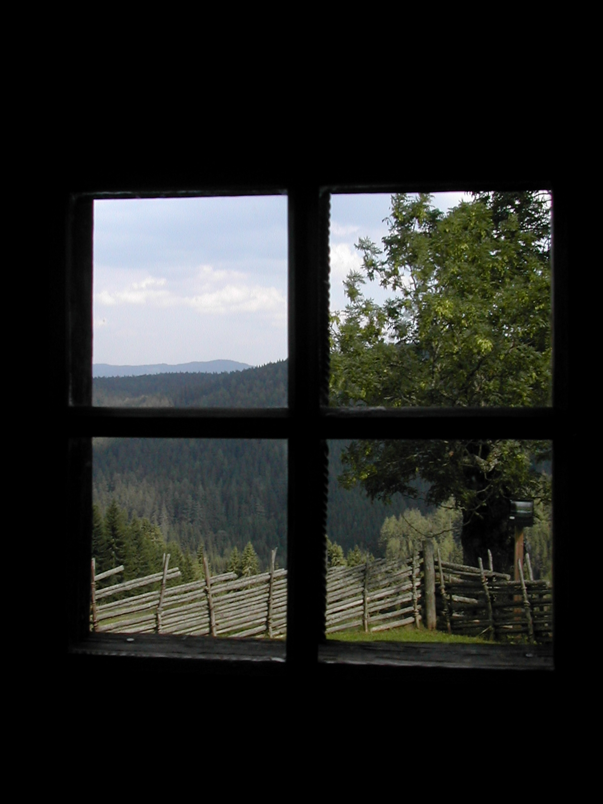 Blick aus Roseggers Geburtshaus